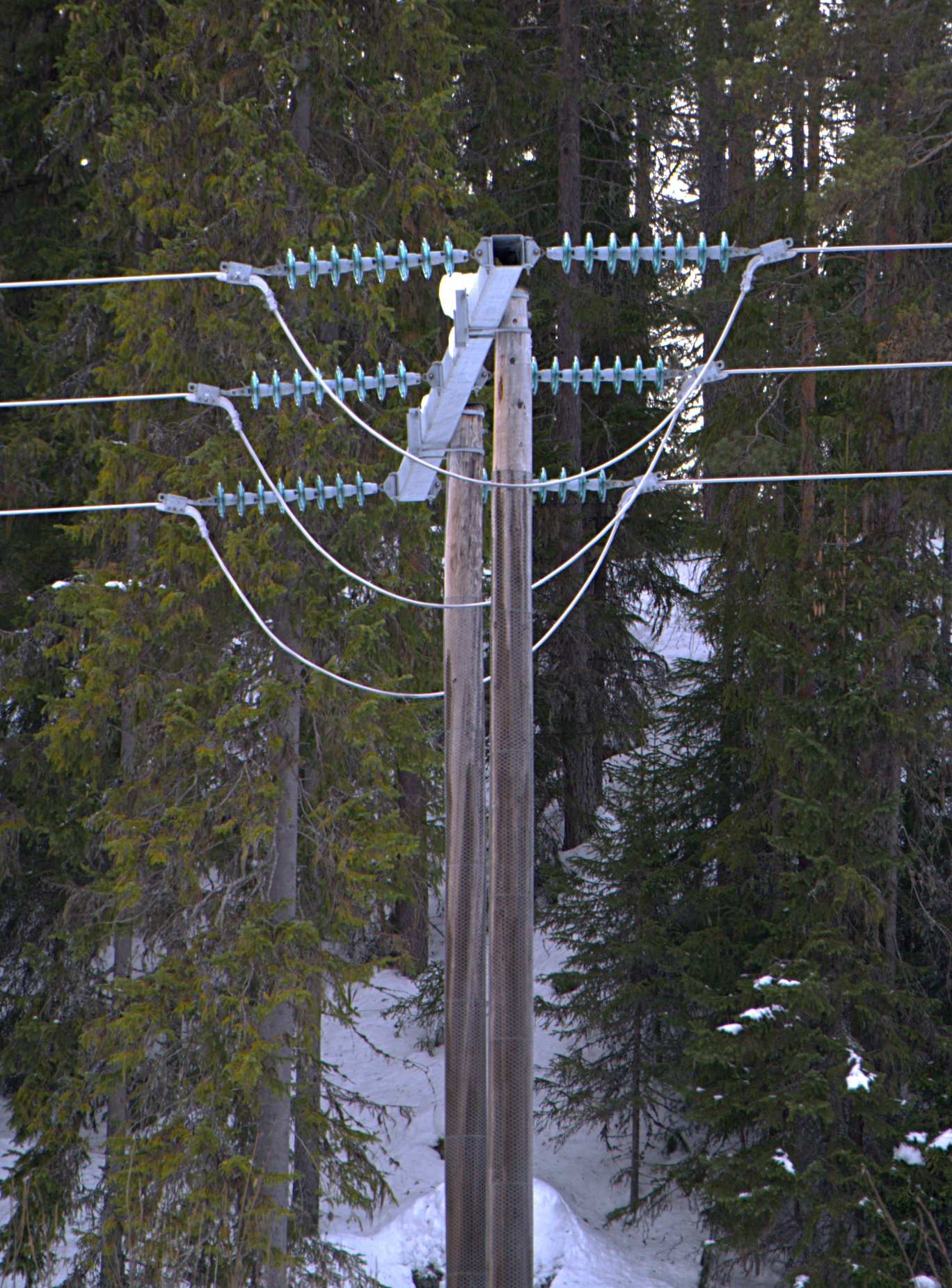 Power line, 132KV, Valdres